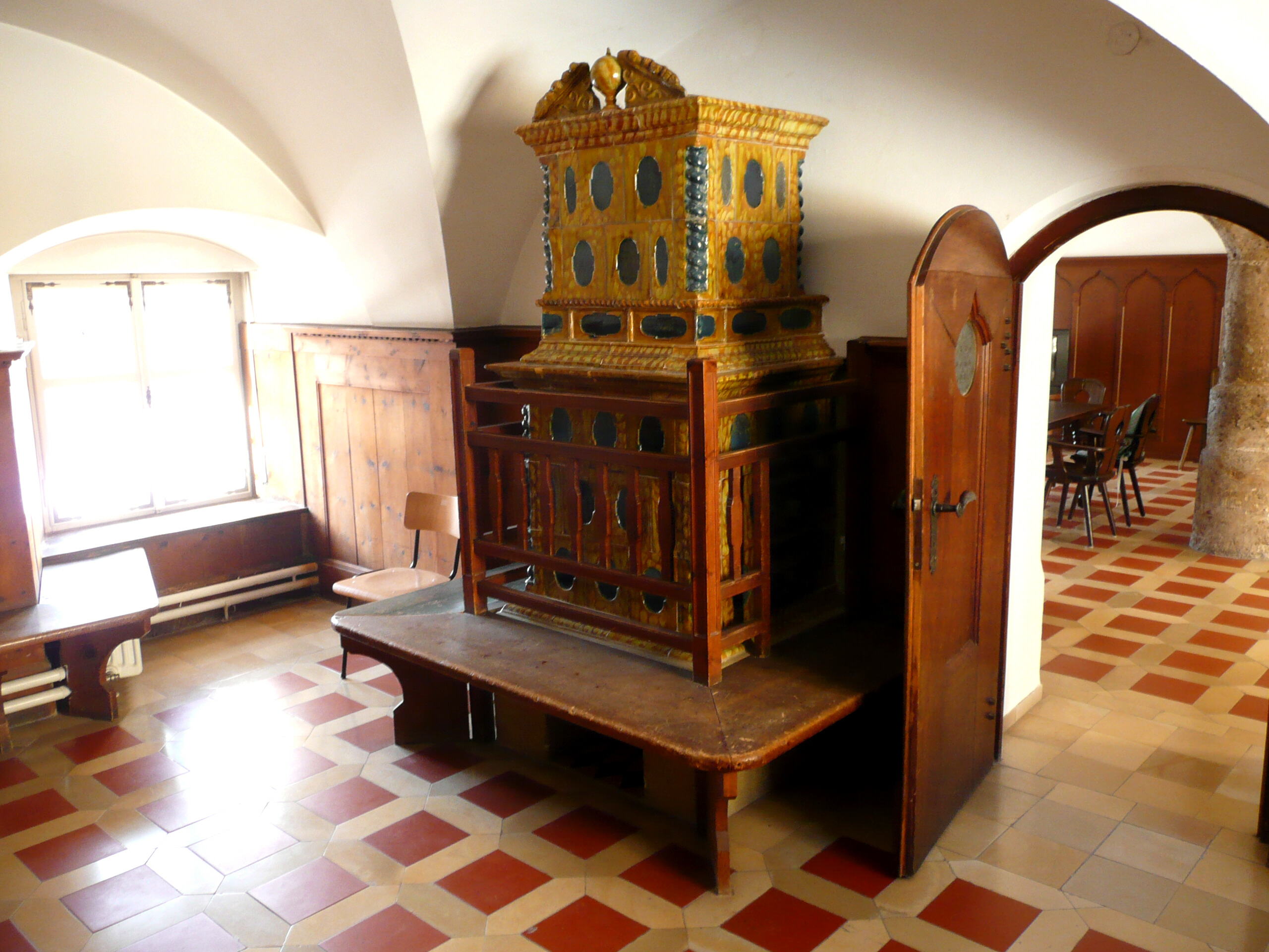 Mittlere der sogenannten "Gotischen Stuben" - Wohn und Essräume der Bediensteten. Vemutlich ehemalige Küche. Bild nachbearbeitet.